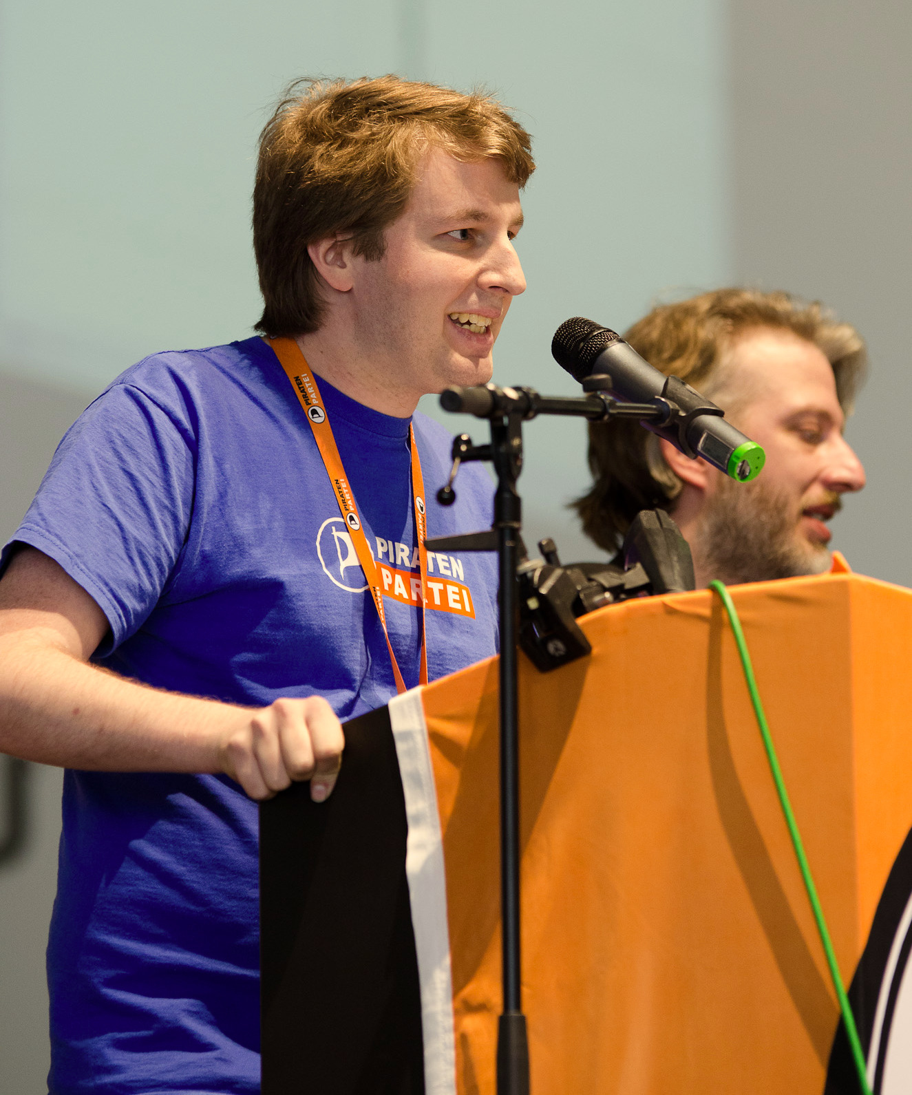 Matthias Schrade